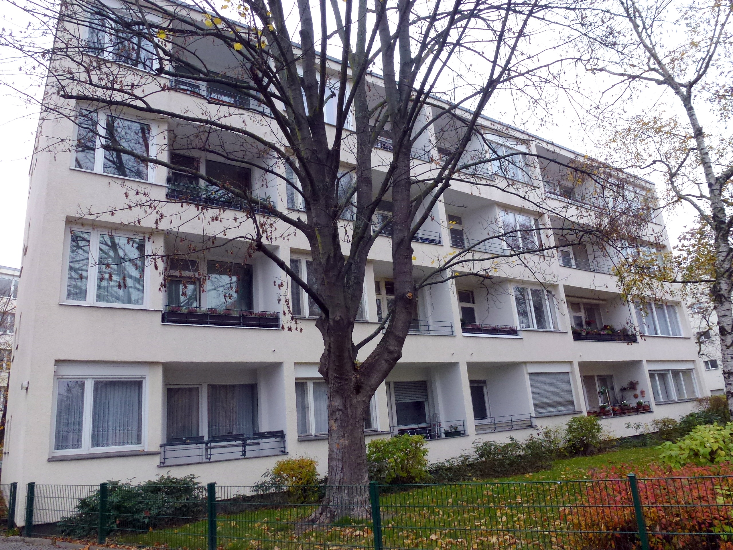 Berlin-Tempelhof Boelckestraße Wohnanlage